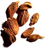 photo de cardamome noire